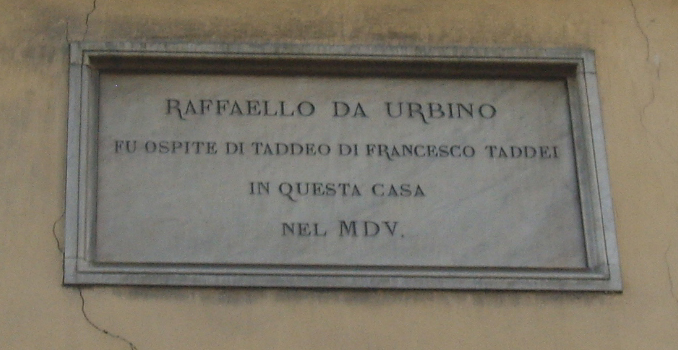 Palazzo Tolomei-Biffi, esterno targa raffaello sanzio